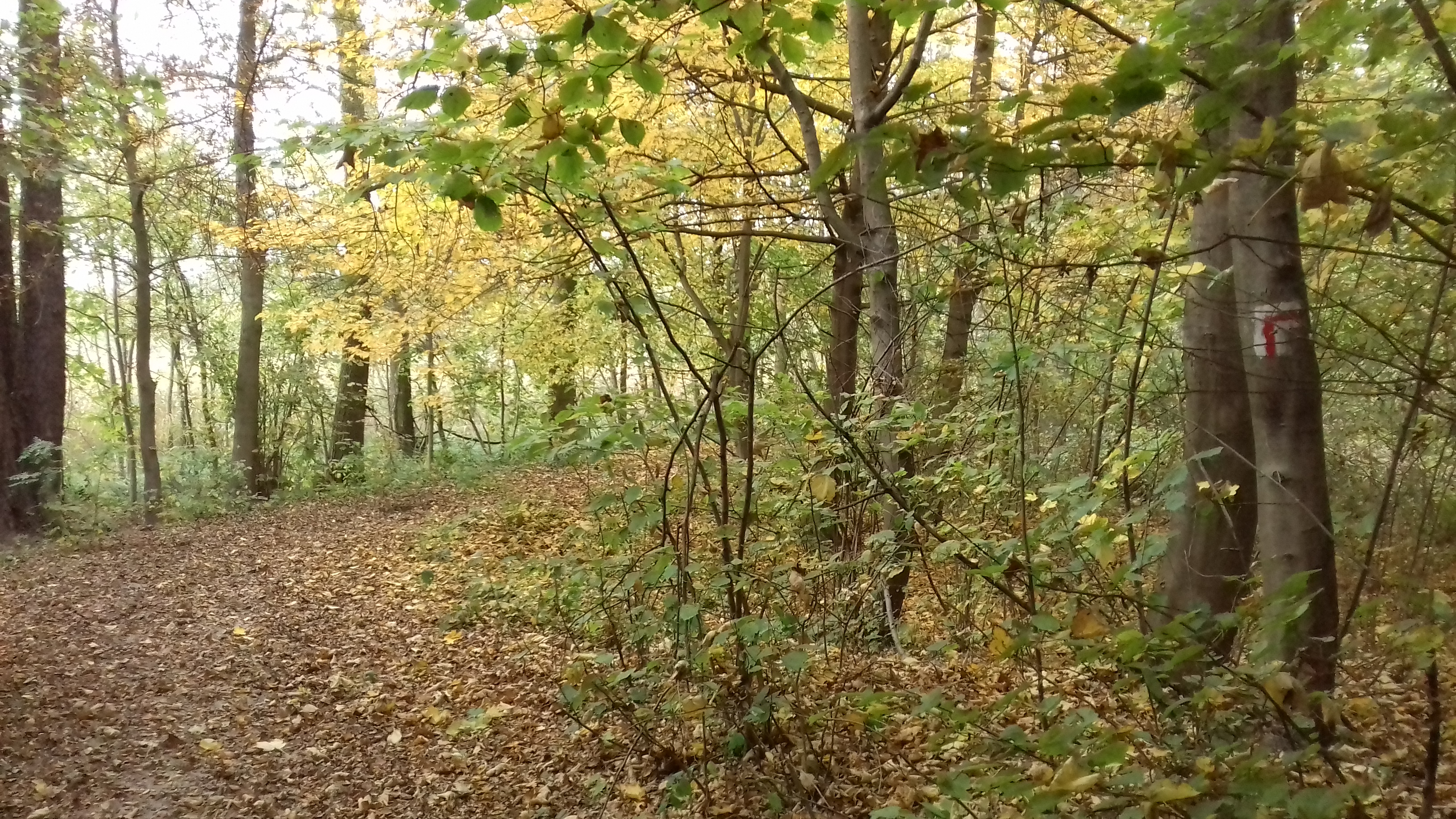 Szlak pieszy nr 186 (czerwony) nad Jeziorem Łękno